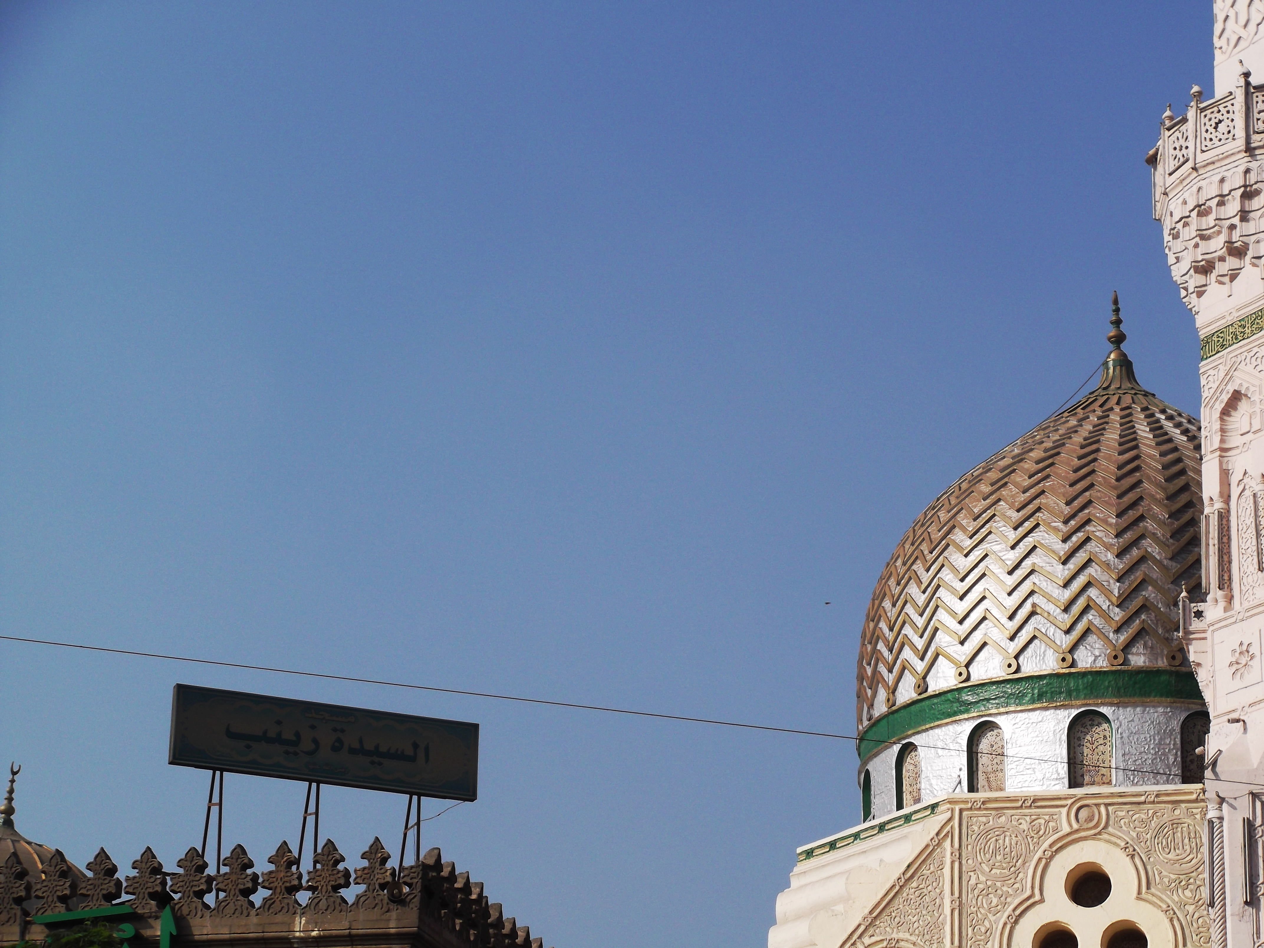 مسجد السيدة زينب بالقاهرة.